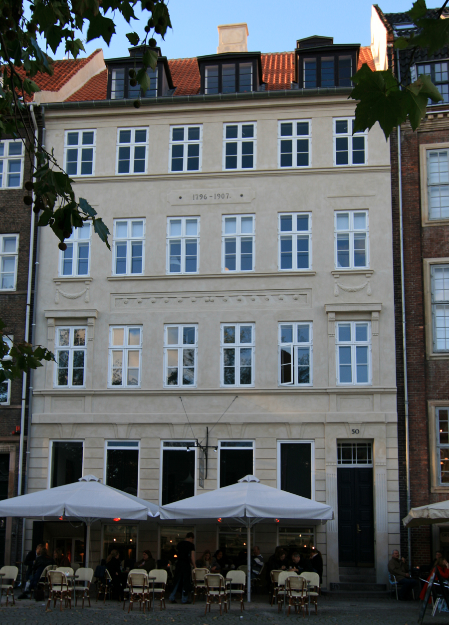 Gammel Strand 50, København. Bygget 1798. Fredet.